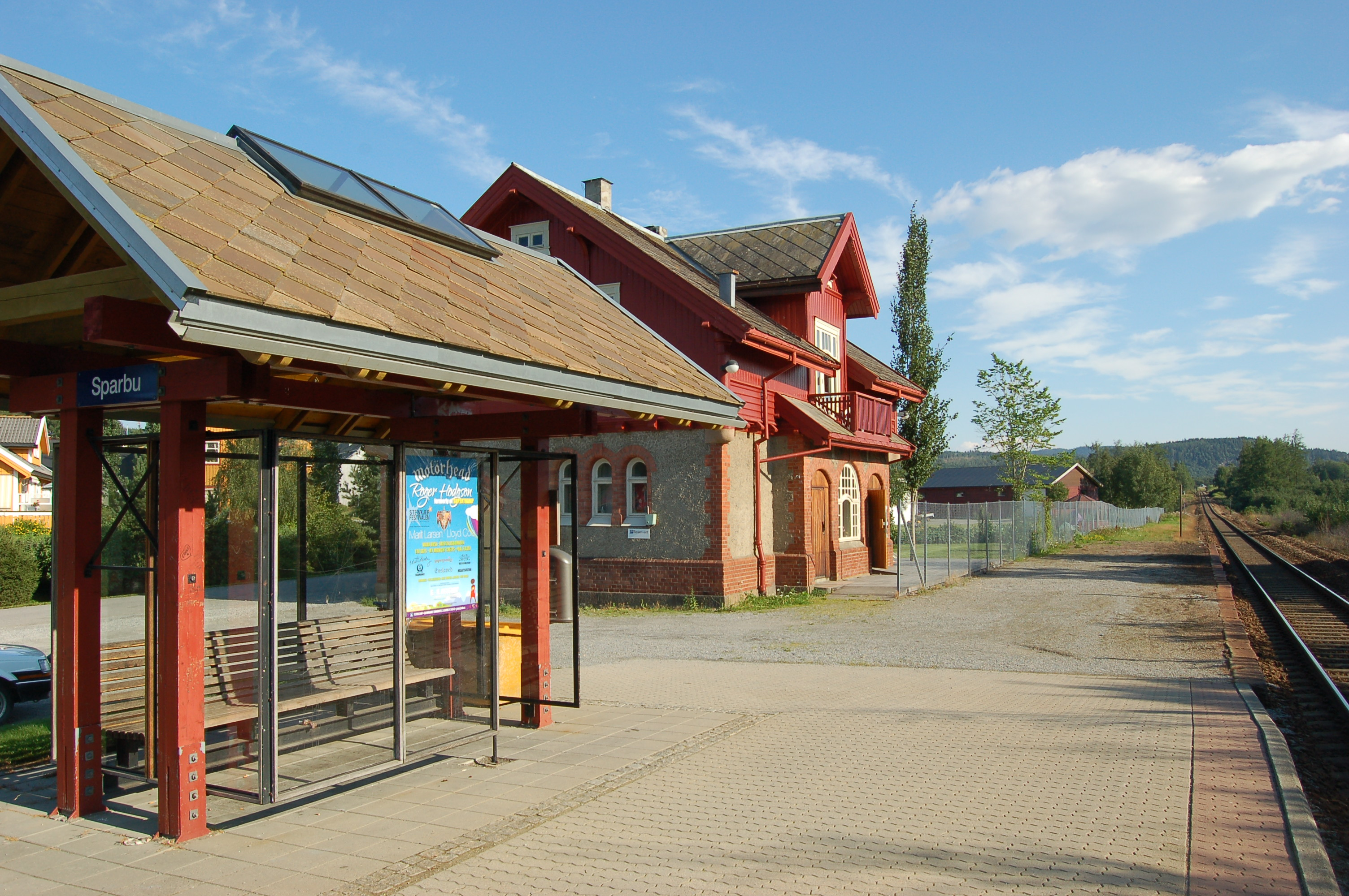 Sparbu Station on Nordlandsbanen in Steinkjer, Norway